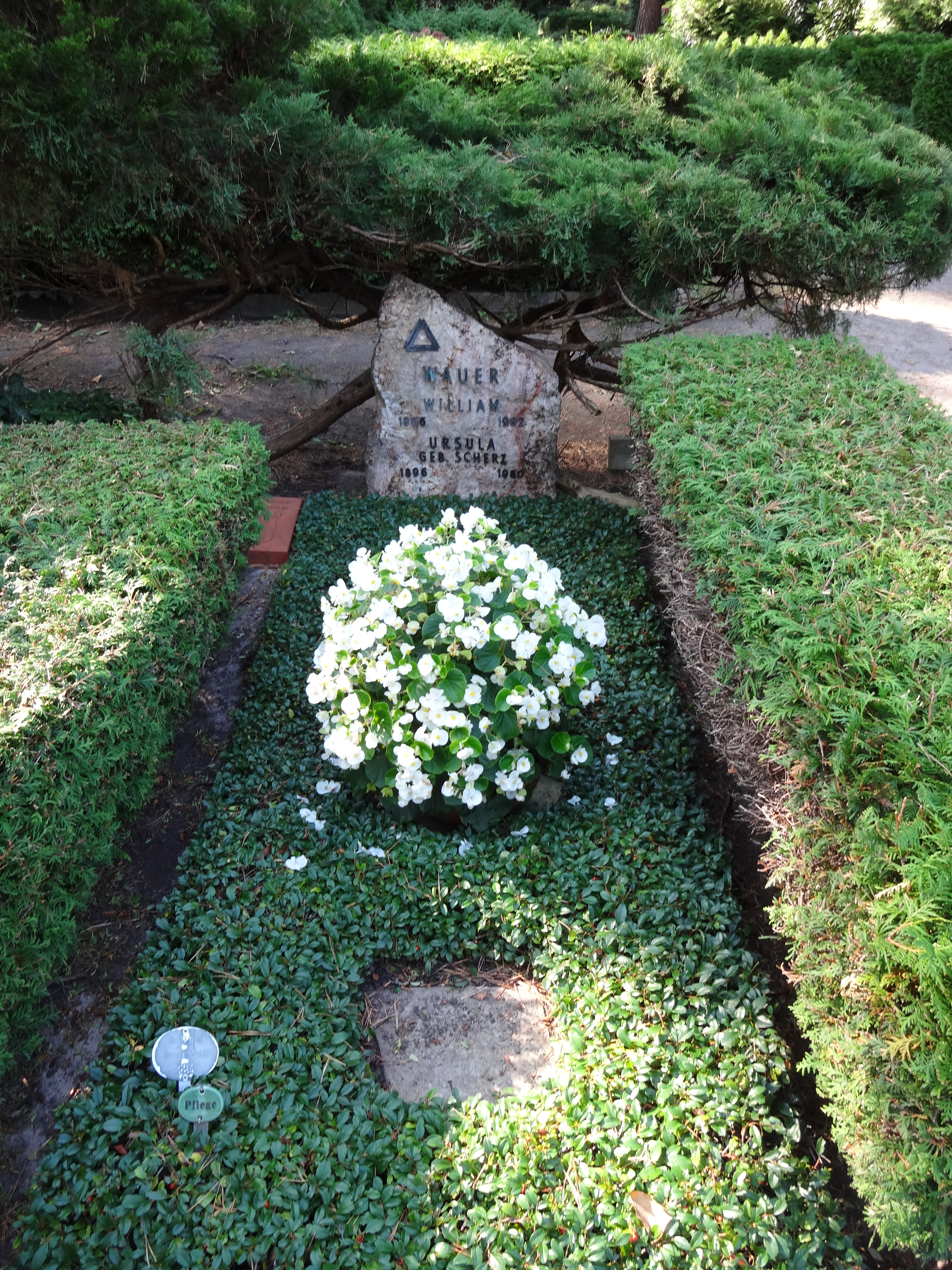 Ehrengrab für Wauer, William auf dem Waldfriedhof Dahlem; der Friedhof ist ein Gartendenkmal in BerlinThis is a photograph of an architectural monument.